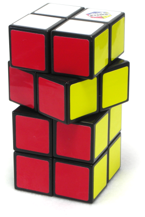 Puzzle:Parallelepipedo rettangolo